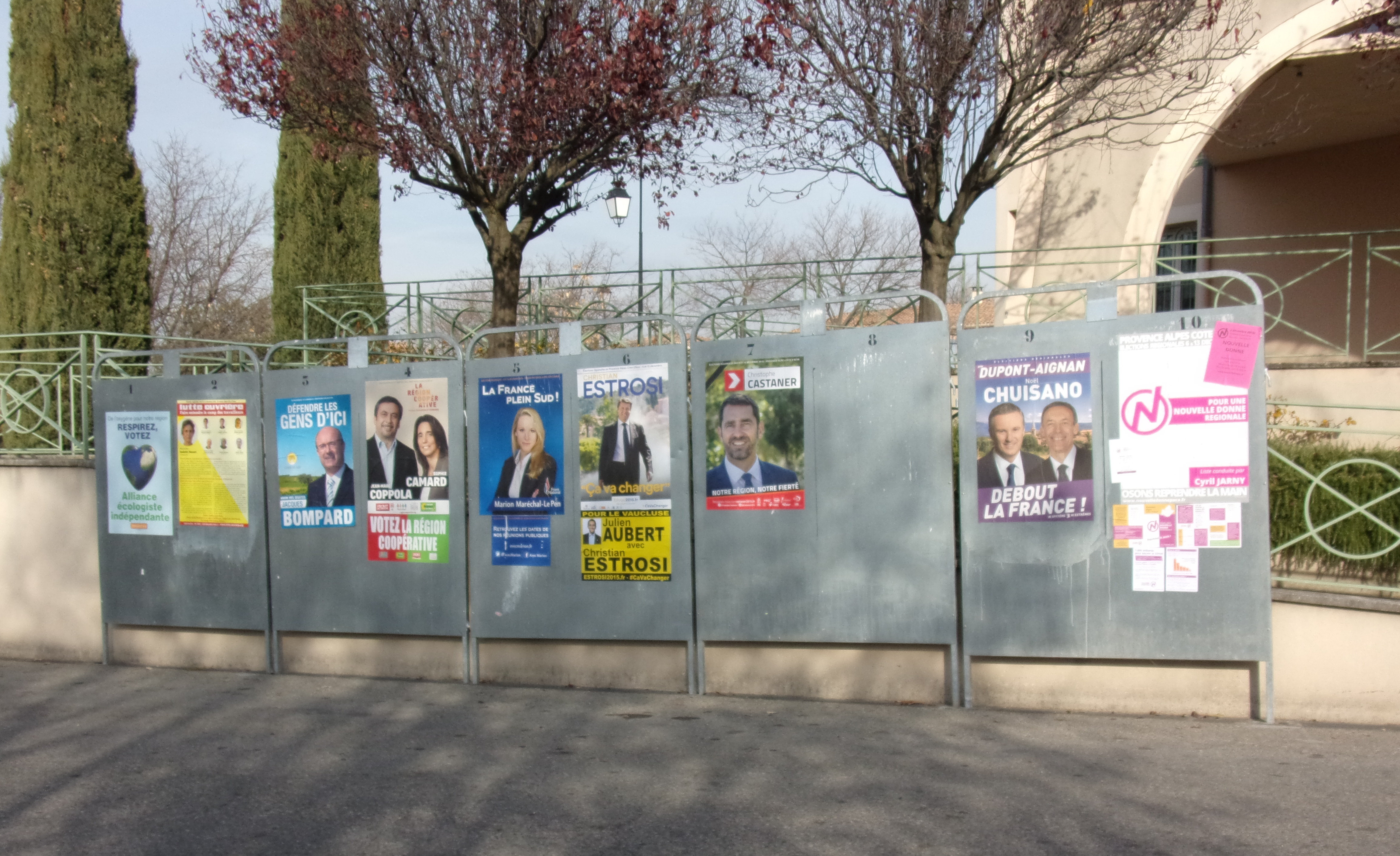 panneaux des candidats au 1er tour des élections régionales Provence-Alpes-Côte d'Azur 2015